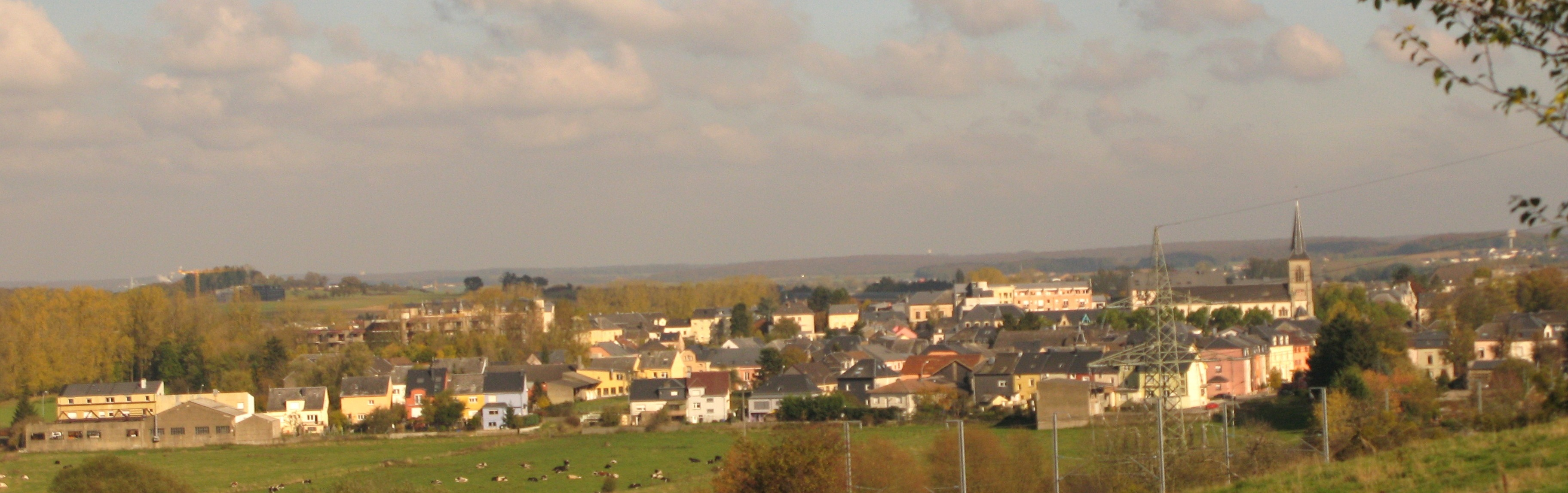 Beetebuerg vum Äppelbierg gesinn